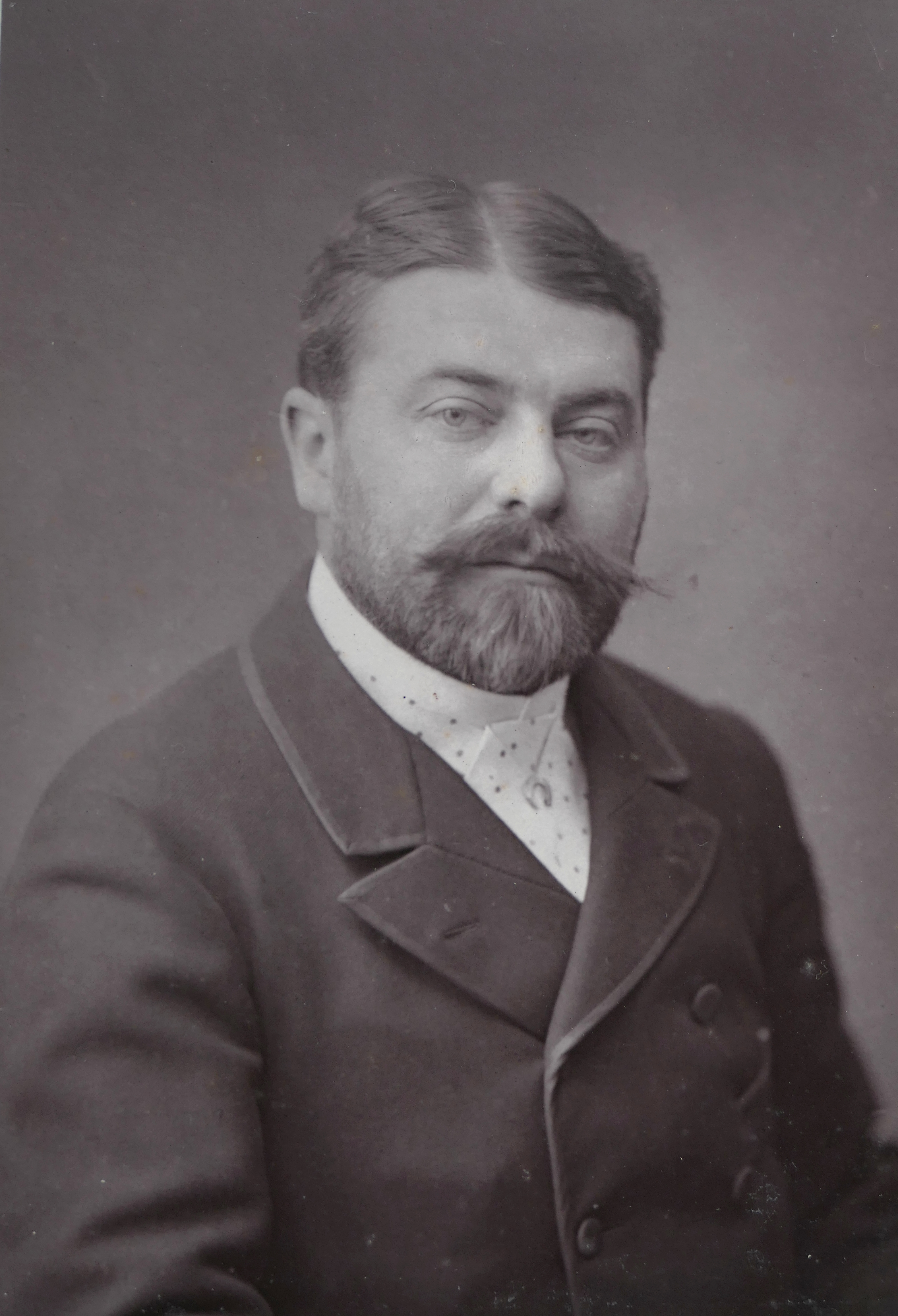 Portrait photographique de Maurice Poirson par Anatole Louis Godet. Reproduction par photoglyptie (Woodburytype).